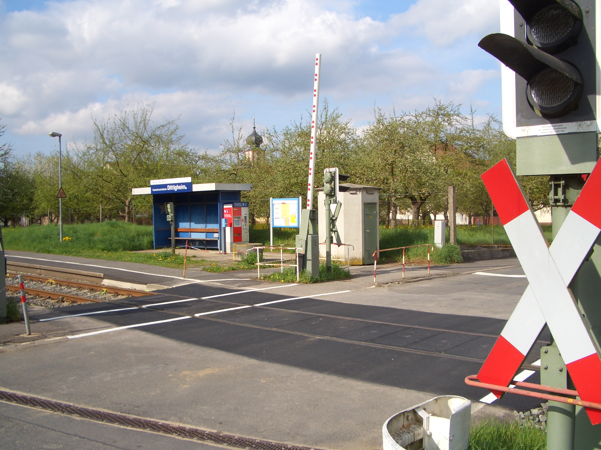 Hp (u) Dittigheim 2013 (Taubertalbahn)